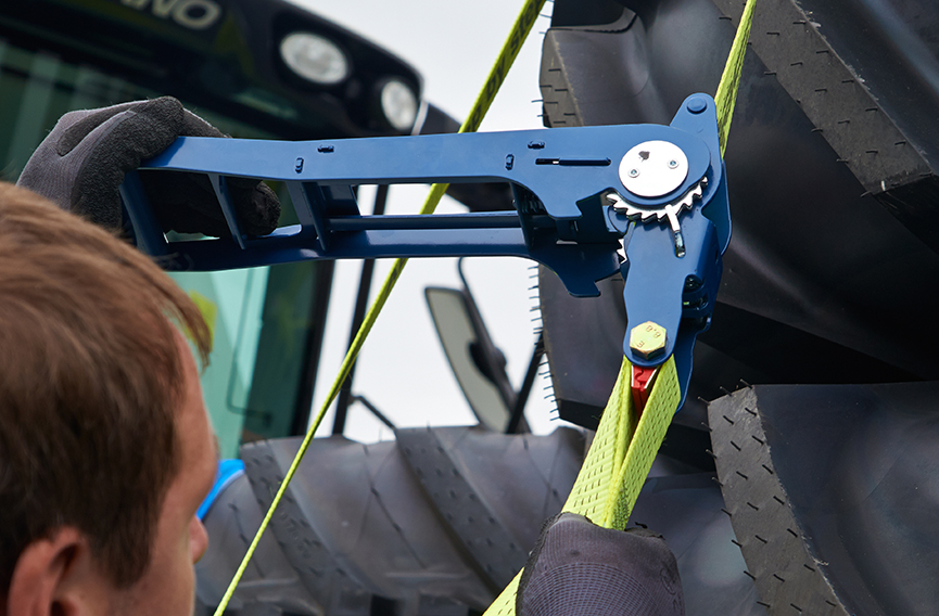 Dieses Foto ist von der SpanSet GmbH & Co. KG, Jülicher Str. 49-51 52531 Übach-Palenberg zur Verfügung gestellt worden. Um das Bild zu verwenden, bedarf es einer Lizenz der SpanSet GmbH & Co. KG.